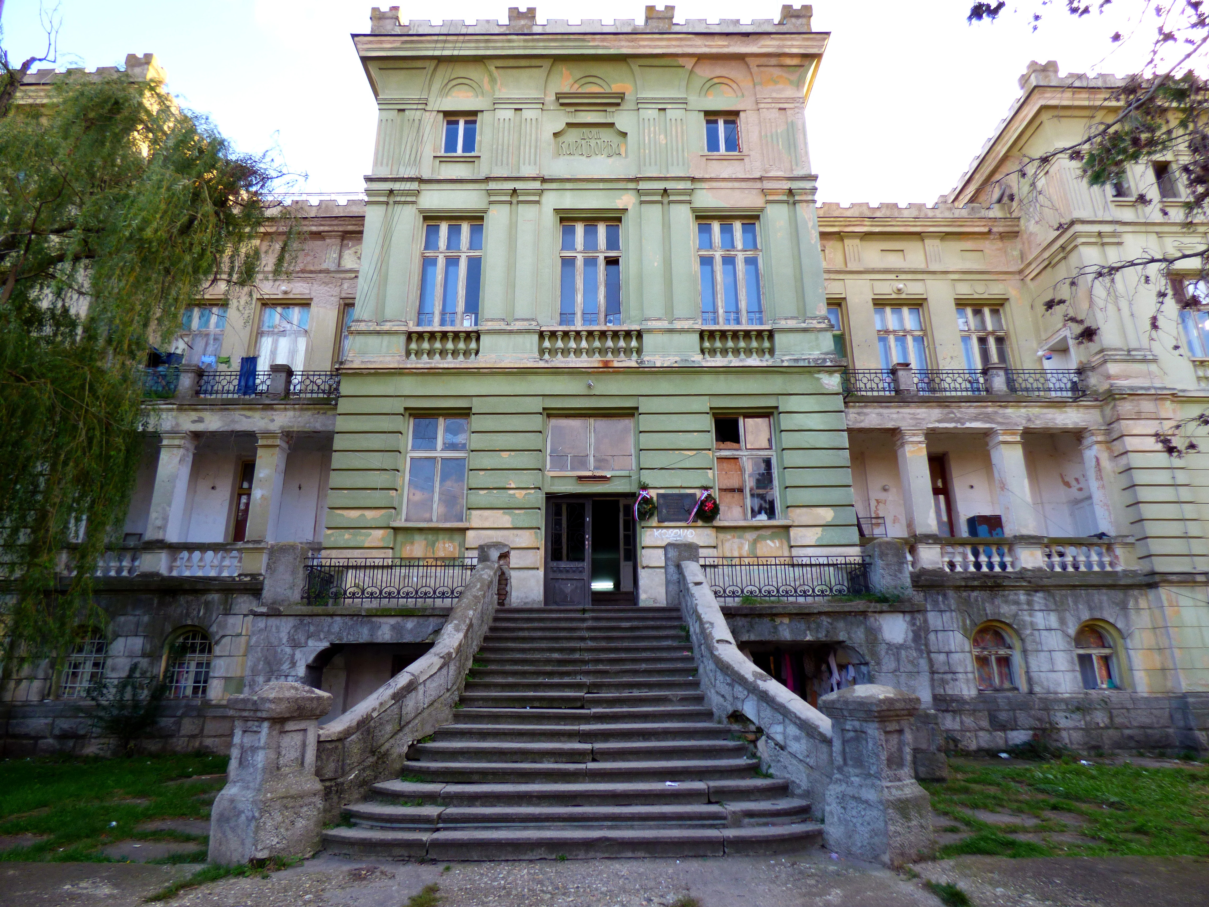 Карађорђев дом представља задужбину краљице Марије која је саграђена још 1932. године. Првобитно је била намењена ратној сирочади. Затим је, у периоду бивше Југославије, имала школску намену. Данас, здање краљице Марије преузима своју првобитну намену – сиротиште. Карађорђев дом представља двоспратну зграду, коју краси 5 зупчастих кула. По својој архитектури, дом је јединствен у Србији. Проглашен је спомеником културе од значаја. Данас се користи за смештај расељених лица са Косова и Метохије.